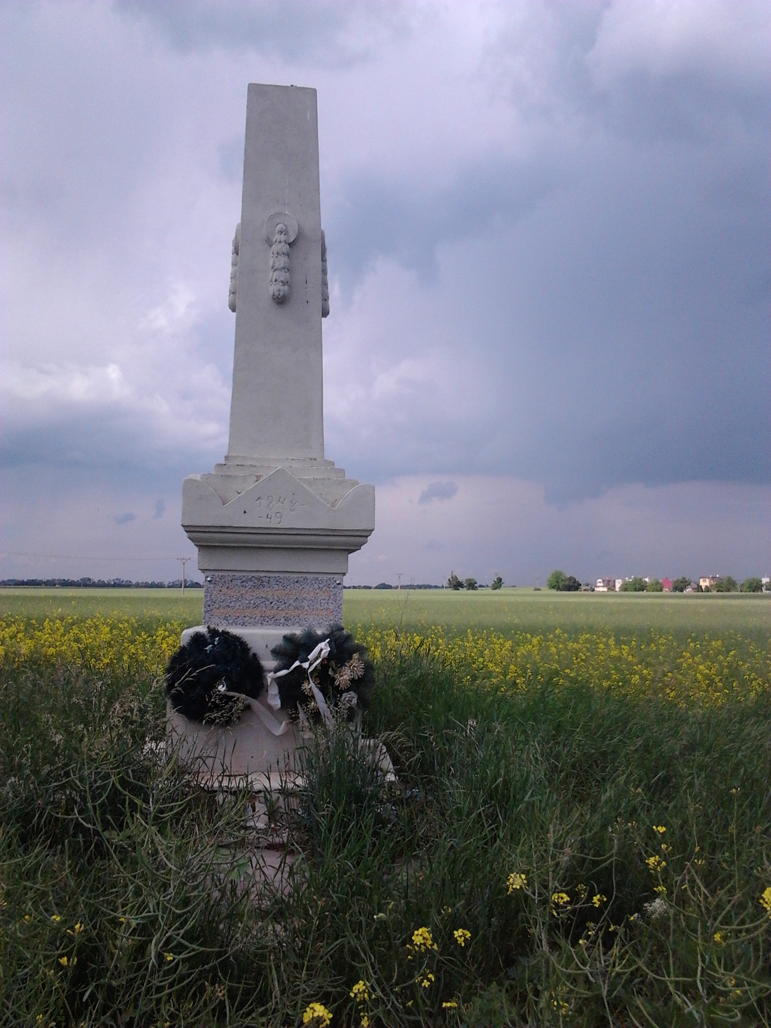 925 53 Pata, Slovakia